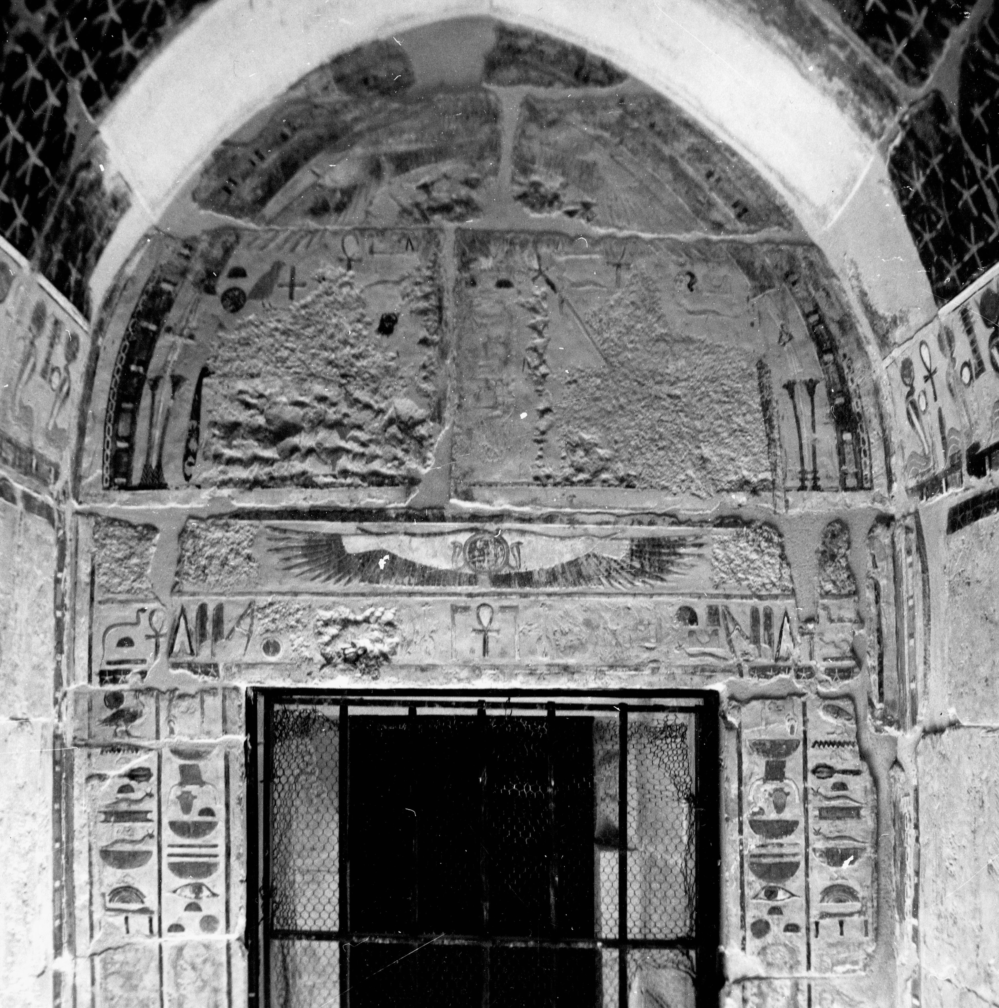 Zdjęcie przedstawia fragment górnej kaplicy Anubisa po pracach konserwatorskich w 1989 r.